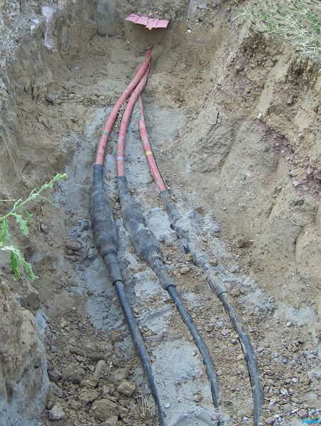 Drei Verbindungsmuffen (Schrumpfmuffen) bei Stromkabeln (Erdkabeln) im Mittelspannungsnetz